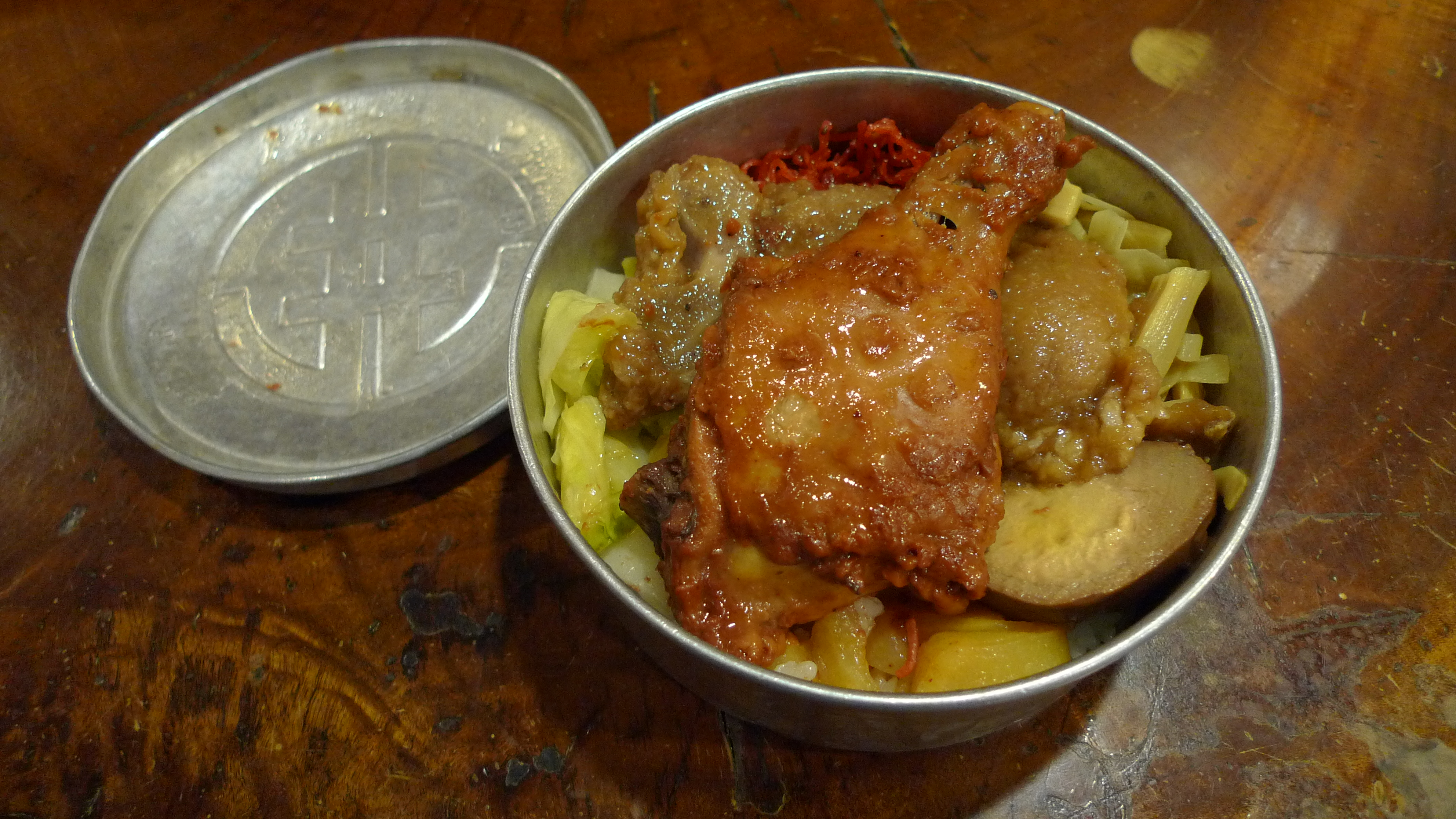 Fenchihu Bento